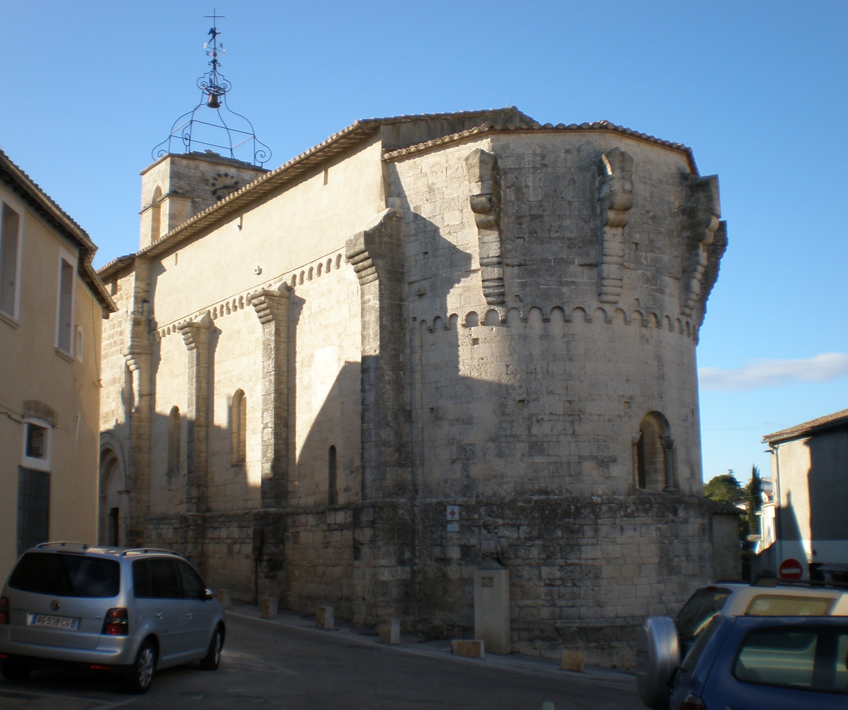 Eglise Saint-Jean-Baptiste (XIIIème siècle) de Castelnau-le-Lez (Hérault, 34)